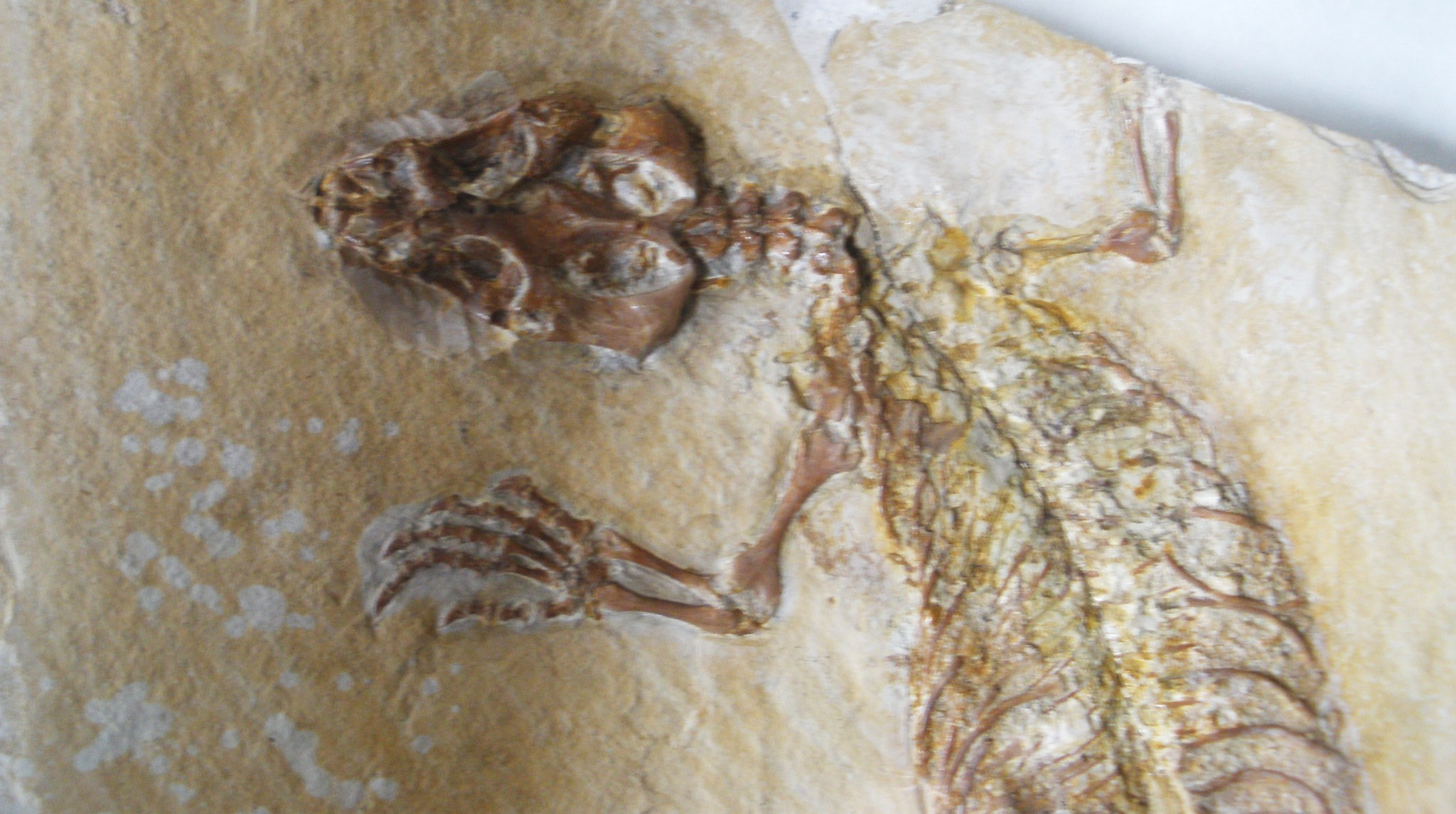 Fossil of Sapheosaurus, an extinct reptile - Took the photo at Teylers Museum, Haarlem